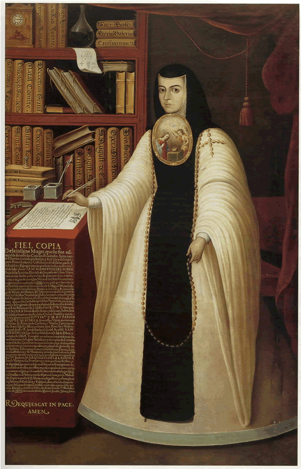 Retrato de Sor Juana Inés de la Cruz (1648-1695), ”copia fiel” siglo XVIII